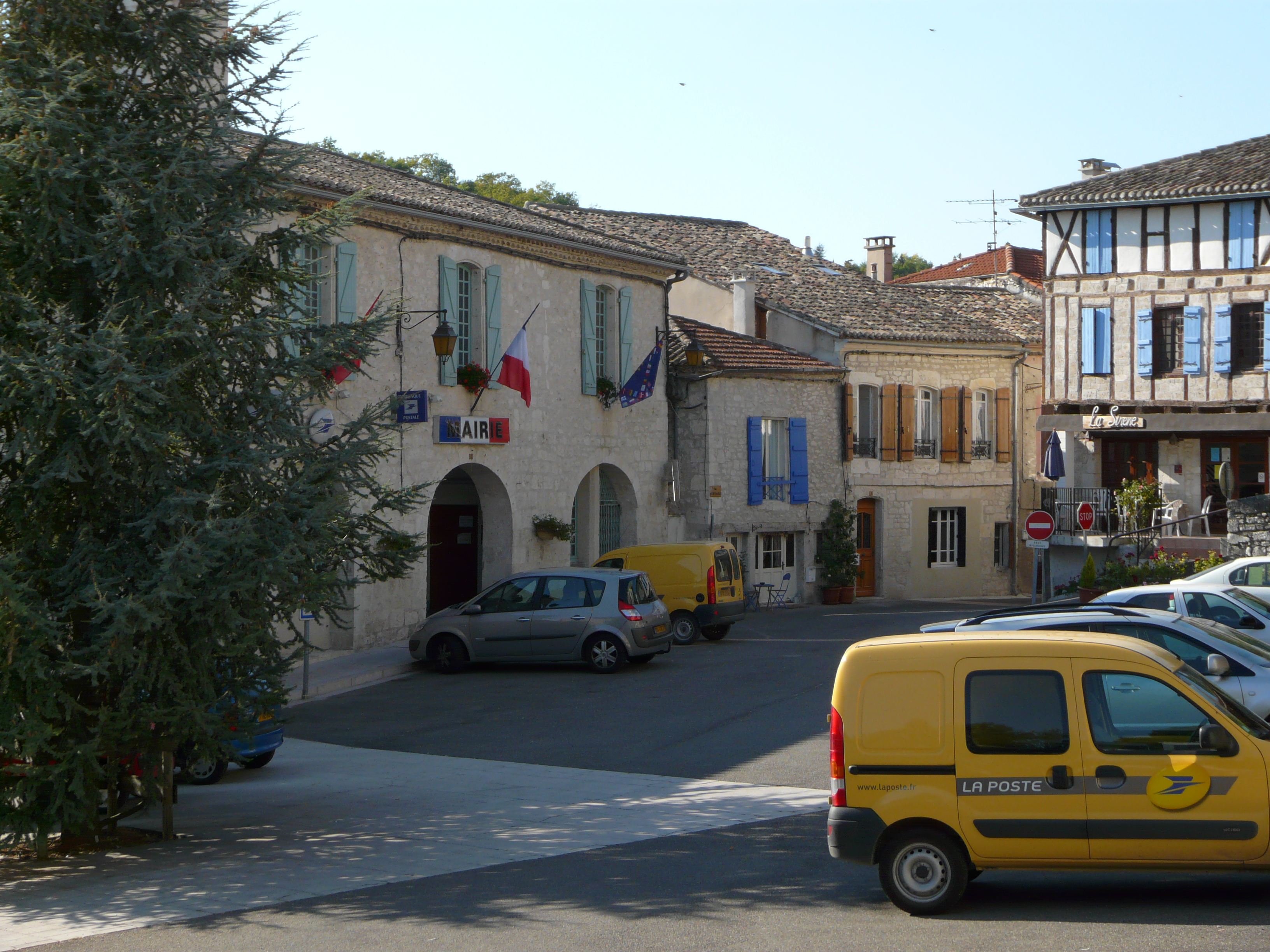 Mairie de Montaigu-de-Quercy (Tarn-et-Garonne, France).